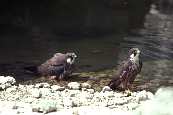 Eleonorenfalken (Falco eleonorae), Sant Elm, Mallorca